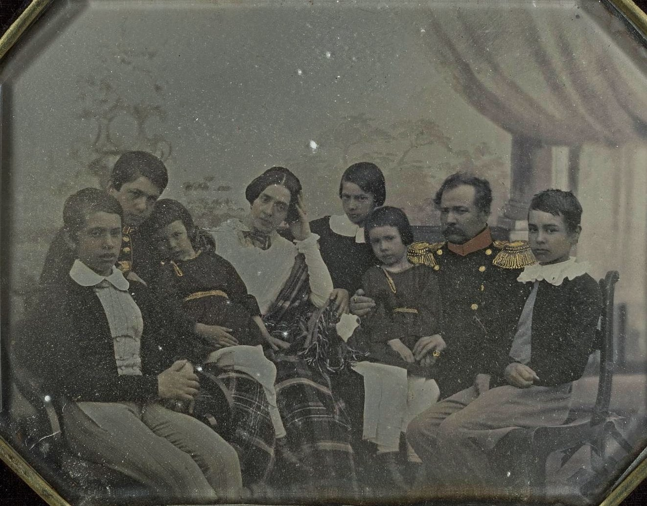 Сергей Николаевич и Миндора Карловна Мухановы с сыновьями